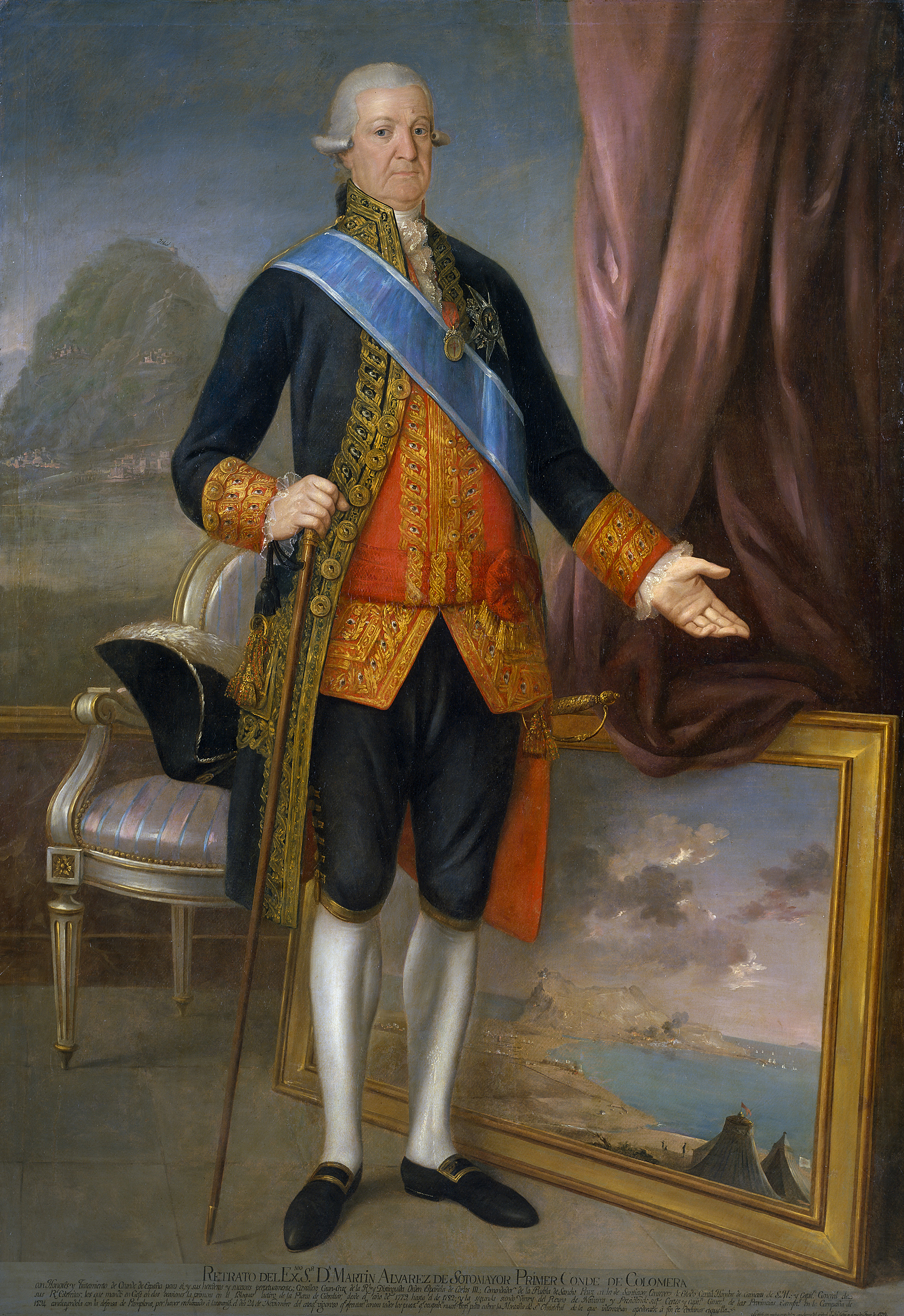 Retrato de Martín Antonio Álvarez de Sotomayor y Soto-Flores (1723–1819), conde de Colomera. Fue virrey de Navarra, capitán general de los Reales Ejércitos Españoles, gentilhombre de cámara del rey, miembro del Consejo de Estado, comendador de la Puebla de Sancho Pérez en la Orden de Santiago y miembro de la Orden de Carlos III.